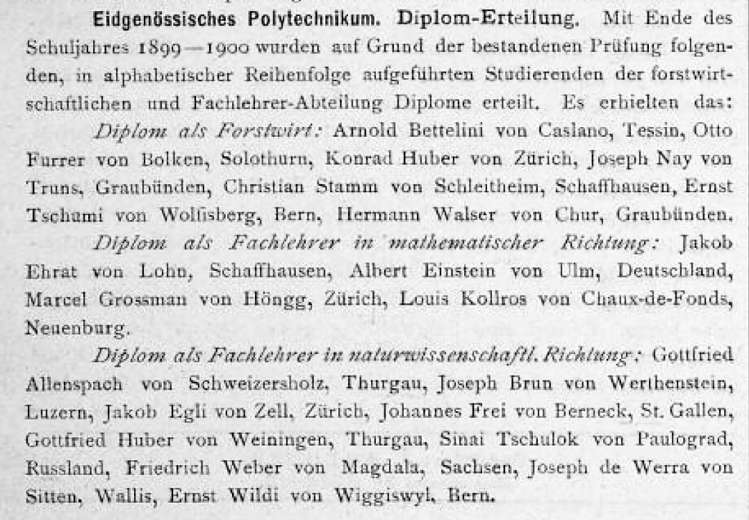 Lehrerdiplome von Albert Einstein und Sinai Tschulok in der Schweizerischen Bauzeitung vom 4. August 1900